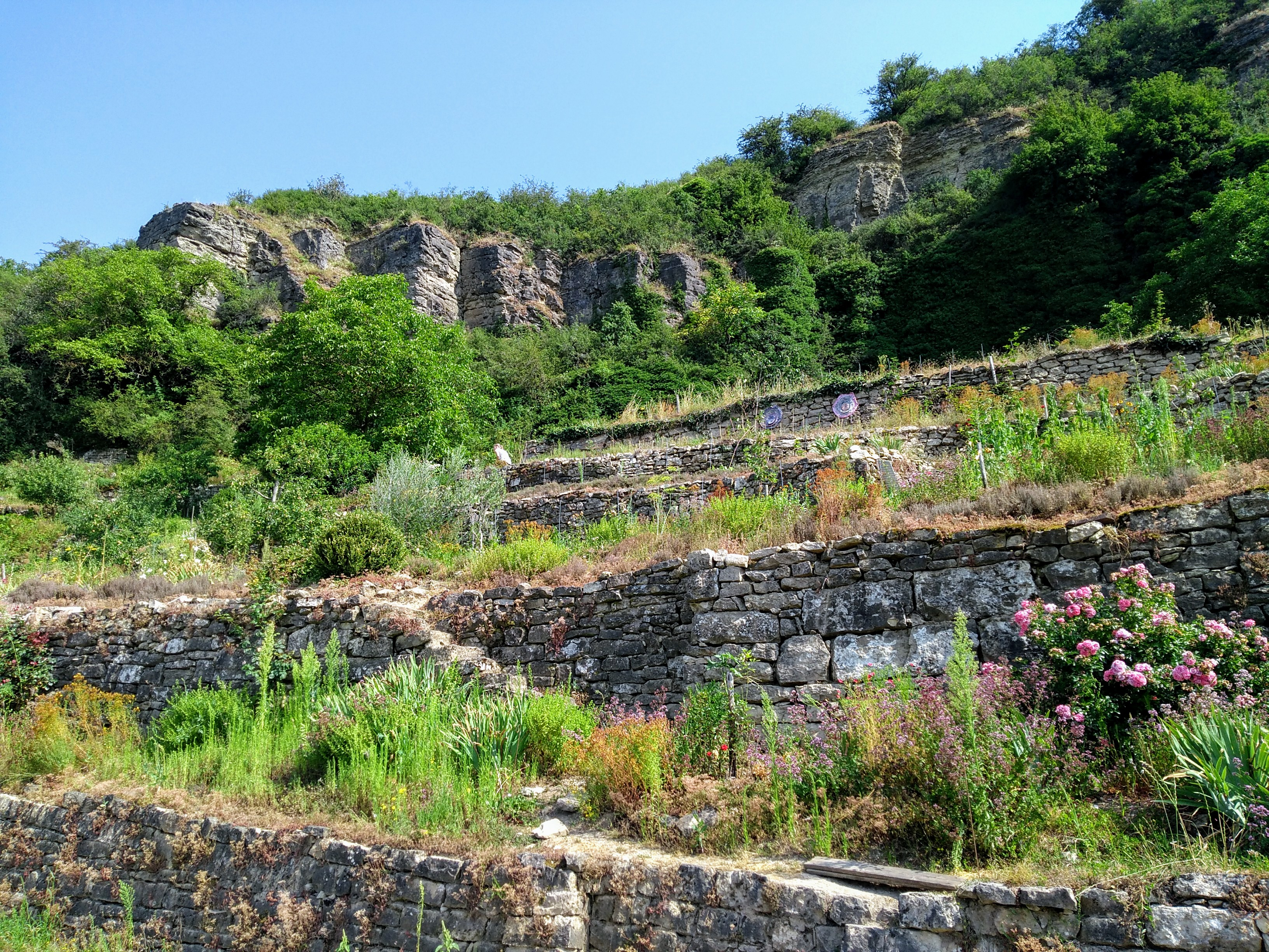 Unmittelbar vor der Felswand wurde früher Wein angebaut. Hier sind die alten Terrassen mit den Trockenmauern noch erhalten geblieben. Heute ist dort ein mediterrraner Garten.